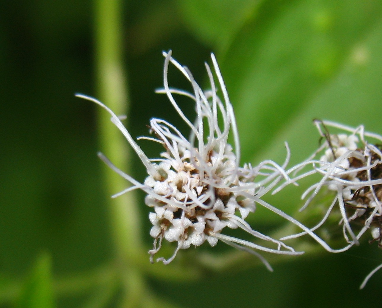 കമ്യൂണിസ്റ്റ് പച്ചയുടെ പൂവ്